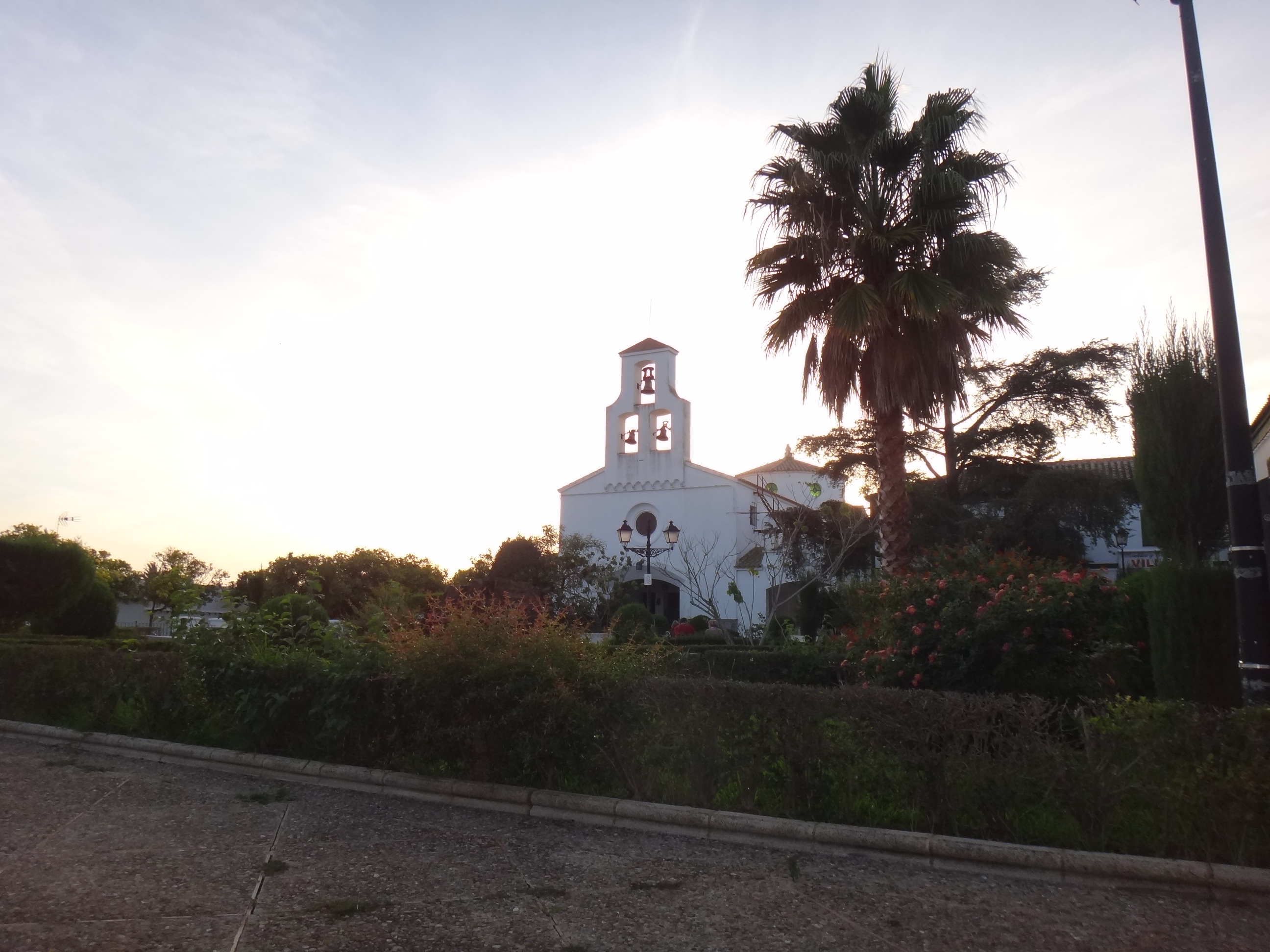 Poblado de José Antonio (carretera de Majarromaque) en Jerez de la Frontera (Andalucía, España)